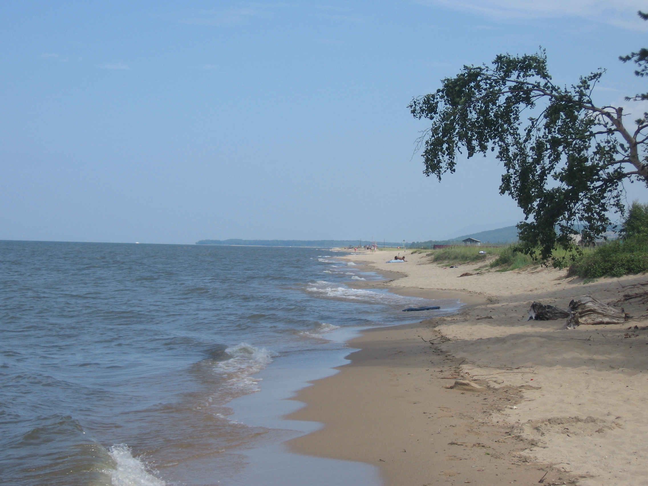 Бурятия